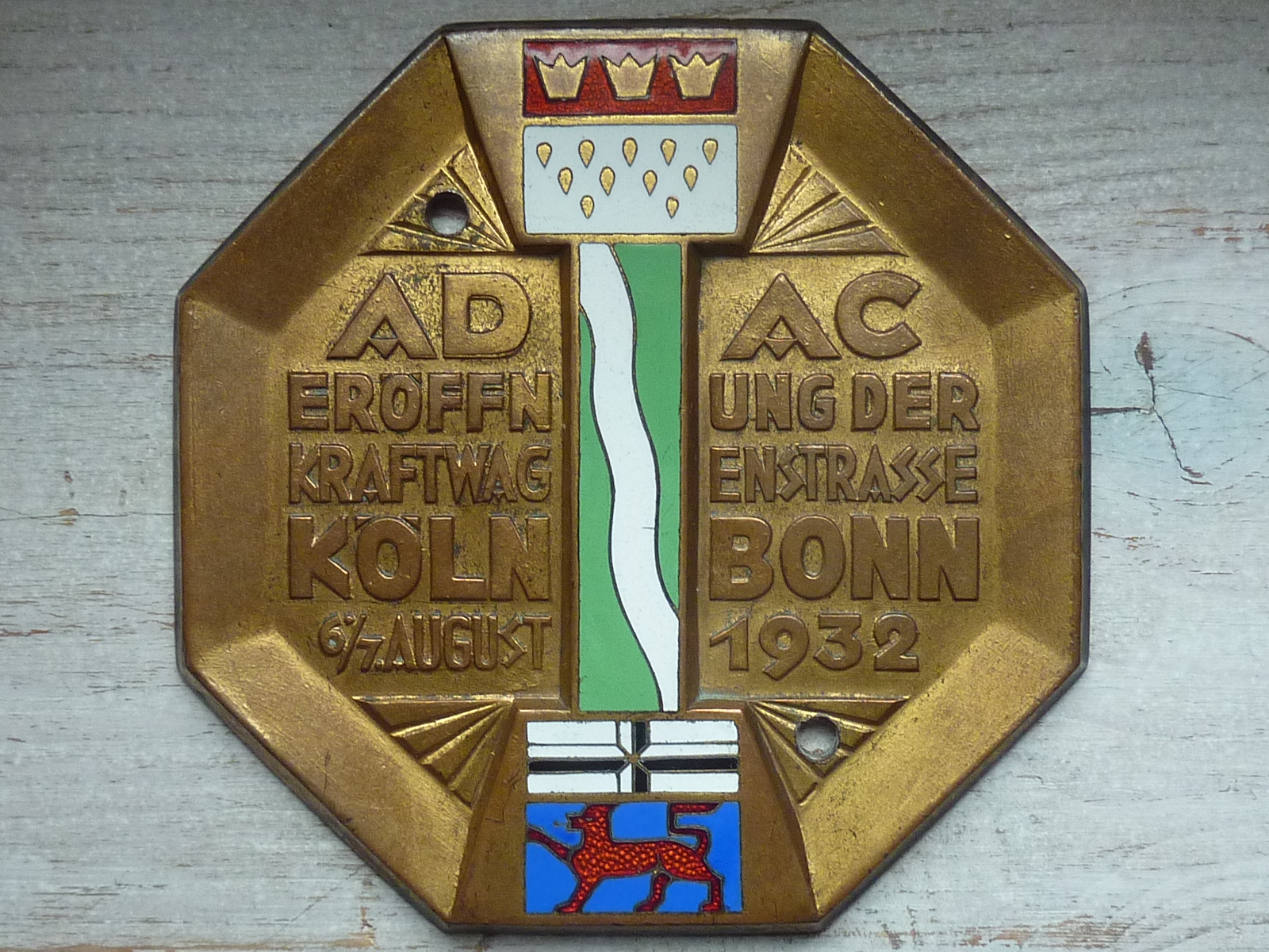 ADAC-Medaille "Eröffnung der Kraftwagenstraße Köln/Bonn 6./7. August 1932"